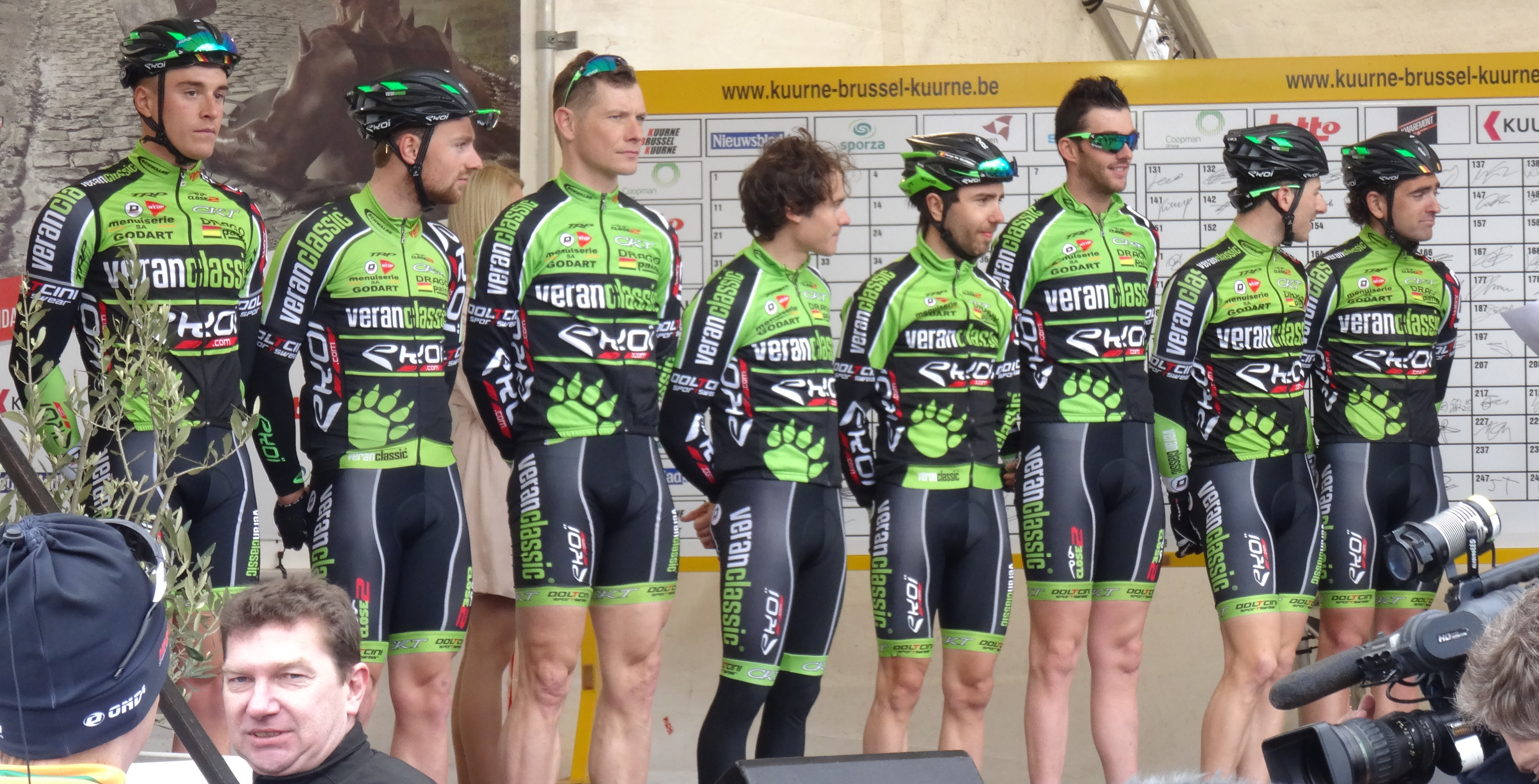 Reportage réalisé le dimanche 1er mars à l'occasion du départ et de l'arrivée de Kuurne-Bruxelles-Kuurne 2015 à Kuurne, Belgique.